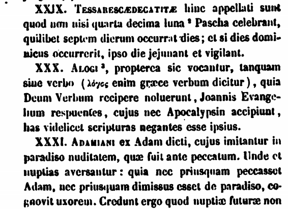 Августин об алогах в сочинении «De Haeresibus ad Quodvultdeum Liber Unus» («Ереси, попущением Бога, в одной книге»)